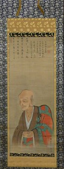 宗賢寺 歴世住職肖像画 笑山全悦